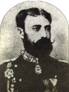 Генерал Йован Анджелкович